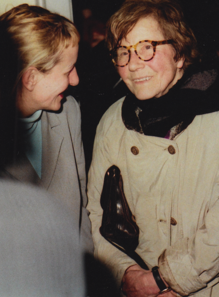 Sabine Groschup im Gespräch mit Maria Lassnig anlässlich der Eröffnung der Ausstellung "Mit eigenen Augen", KünstlerInnen aus der ehemaligen Meisterklasse Maria Lassnig im Heiligenkreuzer Hof Wien, 09. April 2008